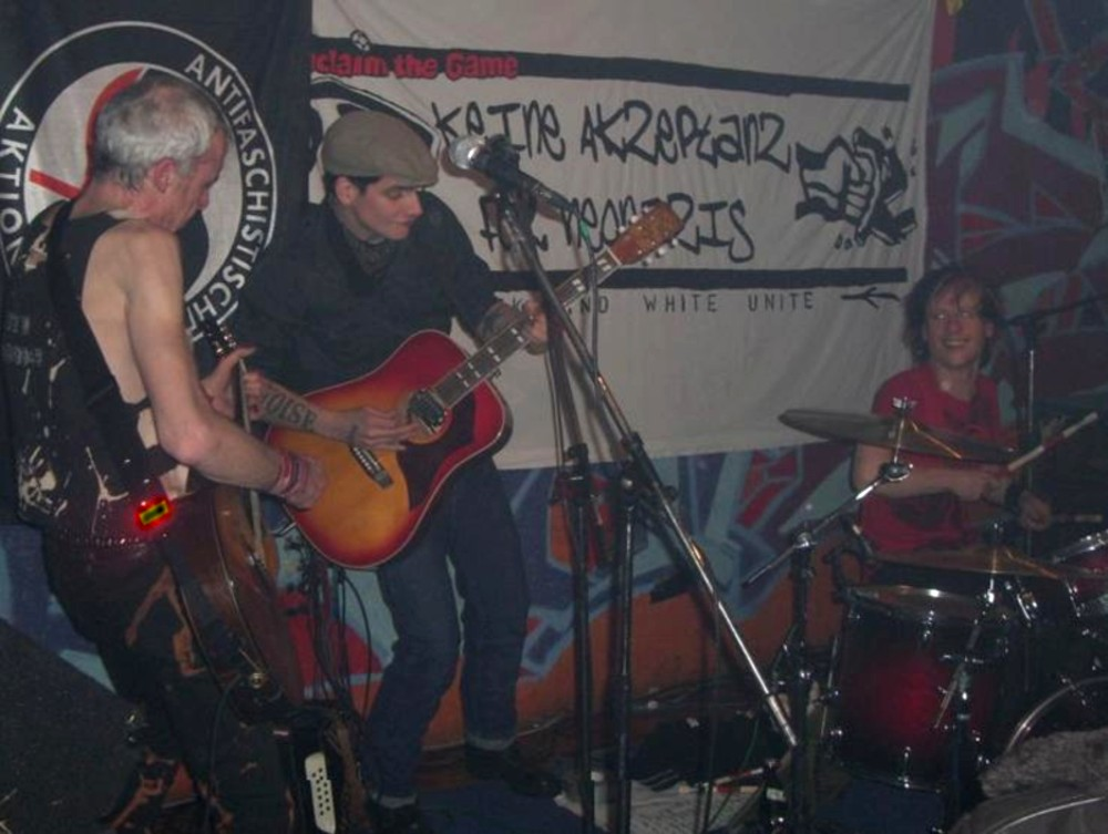 T.V. Smith, Pascal Briggs und Vom Ritchie bei einem Gig im Experanza in Schwäbisch Gmünd am 10. Januar 2009.